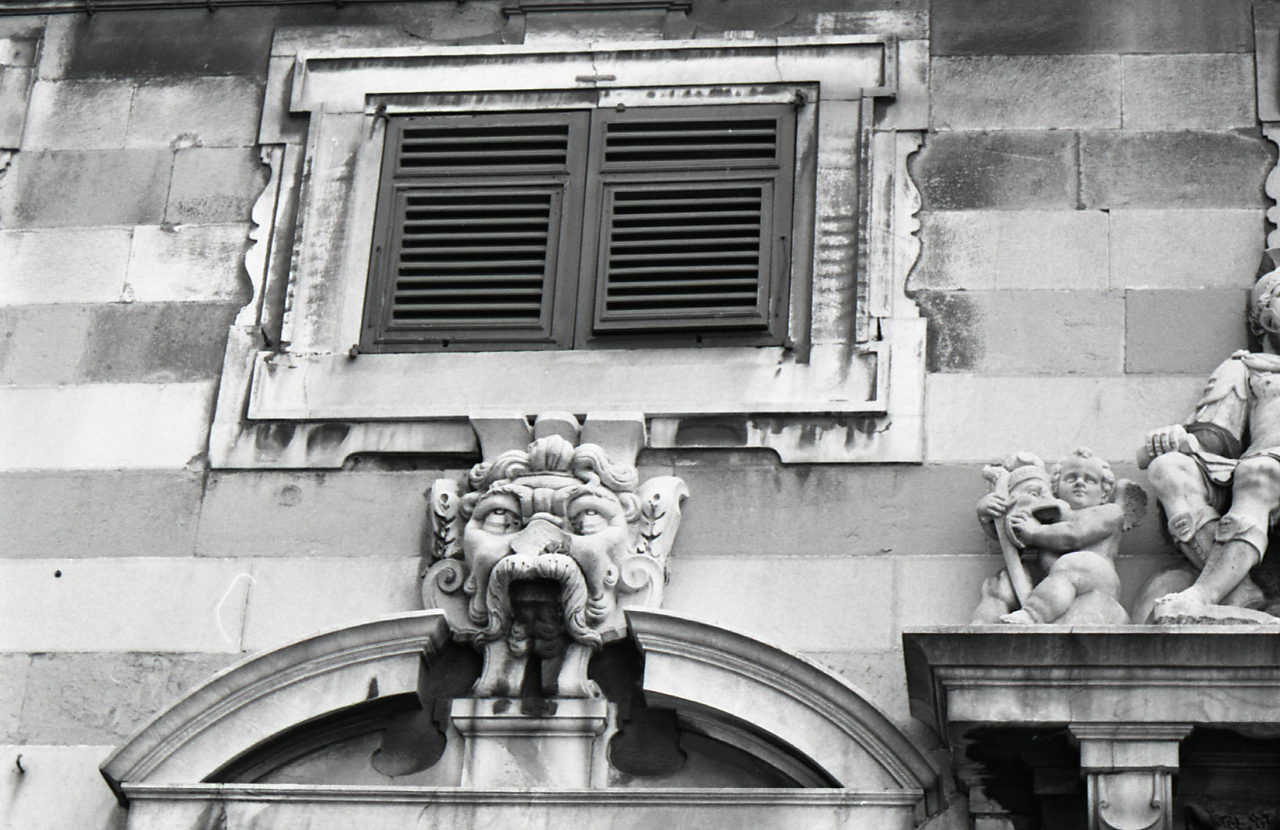 Servizio fotografico : Genova, 1962 / Paolo Monti. - Strisce: 2, Fotogrammi complessivi: 5 : Negativo b/n, gelatina bromuro d'argento/ pellicola ; 35 mm. - ((I fotogrammi hanno una doppia numerazione. - Sul portanegativi: Pentax Plus X. - Occasione: Documentazione di San Lorenzo. - Fonte: Agenda di Paolo Monti: Foto Leica 1 / 1-51 verde, 1-110 nera (1958-1963), presso Archivio Paolo Monti